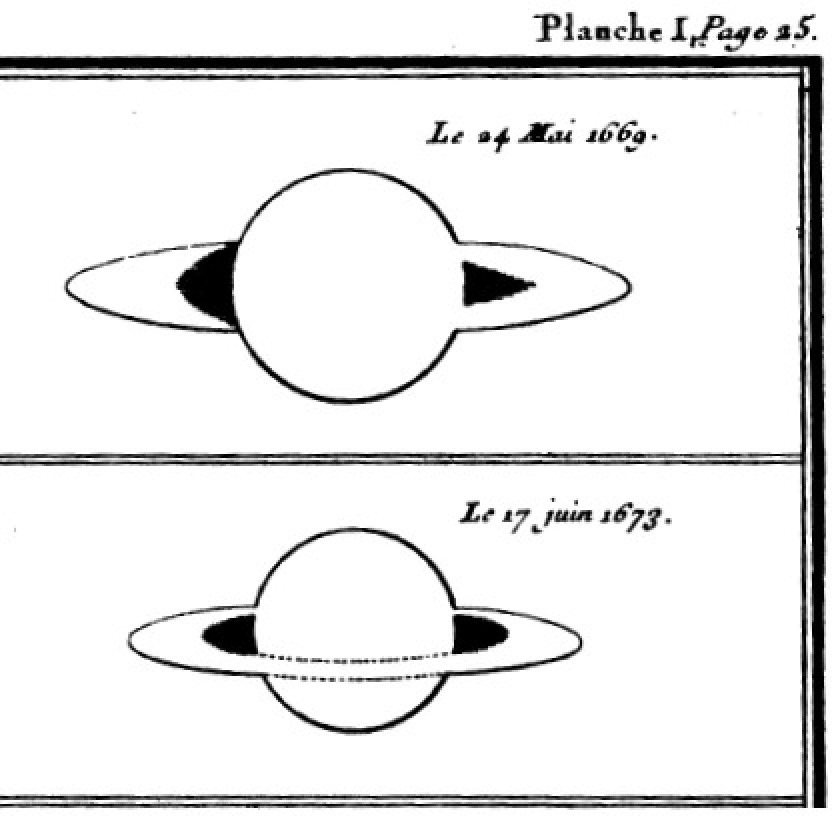 Dessins de Saturne, d'après Picard.